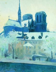 Pintura conservada al Cau Ferrat de Sitges